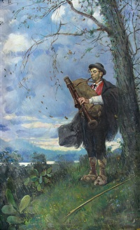 Luca Postiglione, Le Berger à la cornemuse, 103 x 63 cm, coll. part.